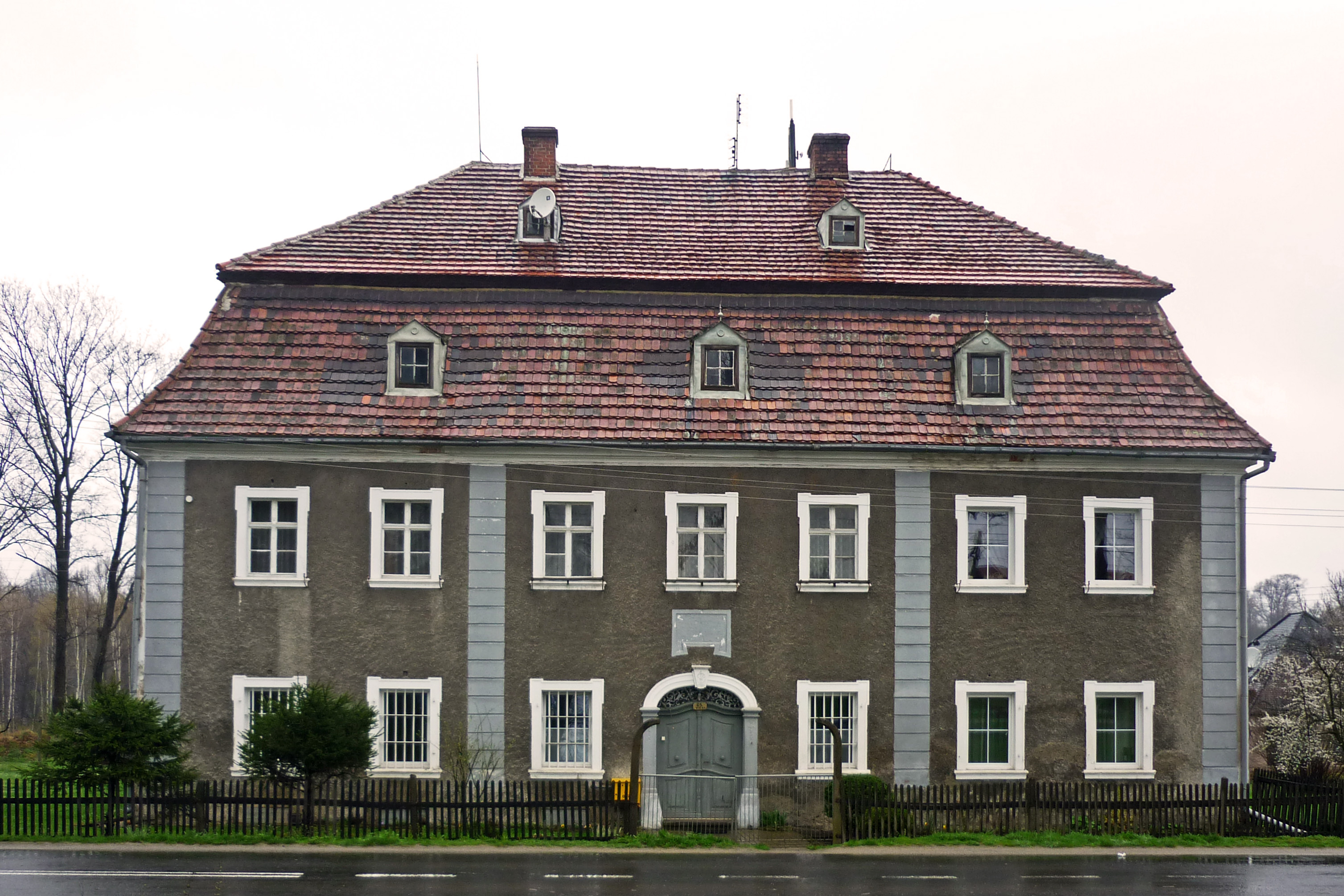 Wohnhaus in Wiesa (Wieża) bei Greiffenberg (Gryfów) in der polnischen Oberlausitz, errichtet 1780.